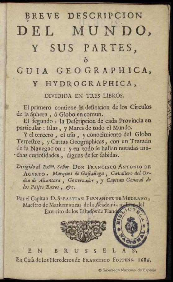 Breve descripcion del mundo y sus partes ó guia geographica y hidrographica : dividida en tres libros... por el capitan D. Sebastian Fernández de Medrano... Autor: Fernández de Medrano, Sebastián (1646-1705) Fecha: 1686 Datos de edición: En Brusselas, en casa de los herederos de Francisco Foppens